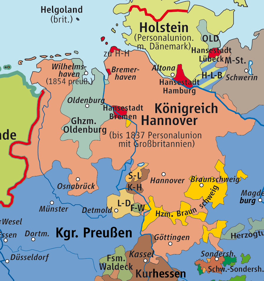 Karte des »Königreichs Hannover« 1815–1866 / Map of »Kingdom of Hannover« 1815–1866 – Based on Karte des »Deutschen Bundes« 1815–1866 / Map of »German Confederation« 1815–1866 by kgberger